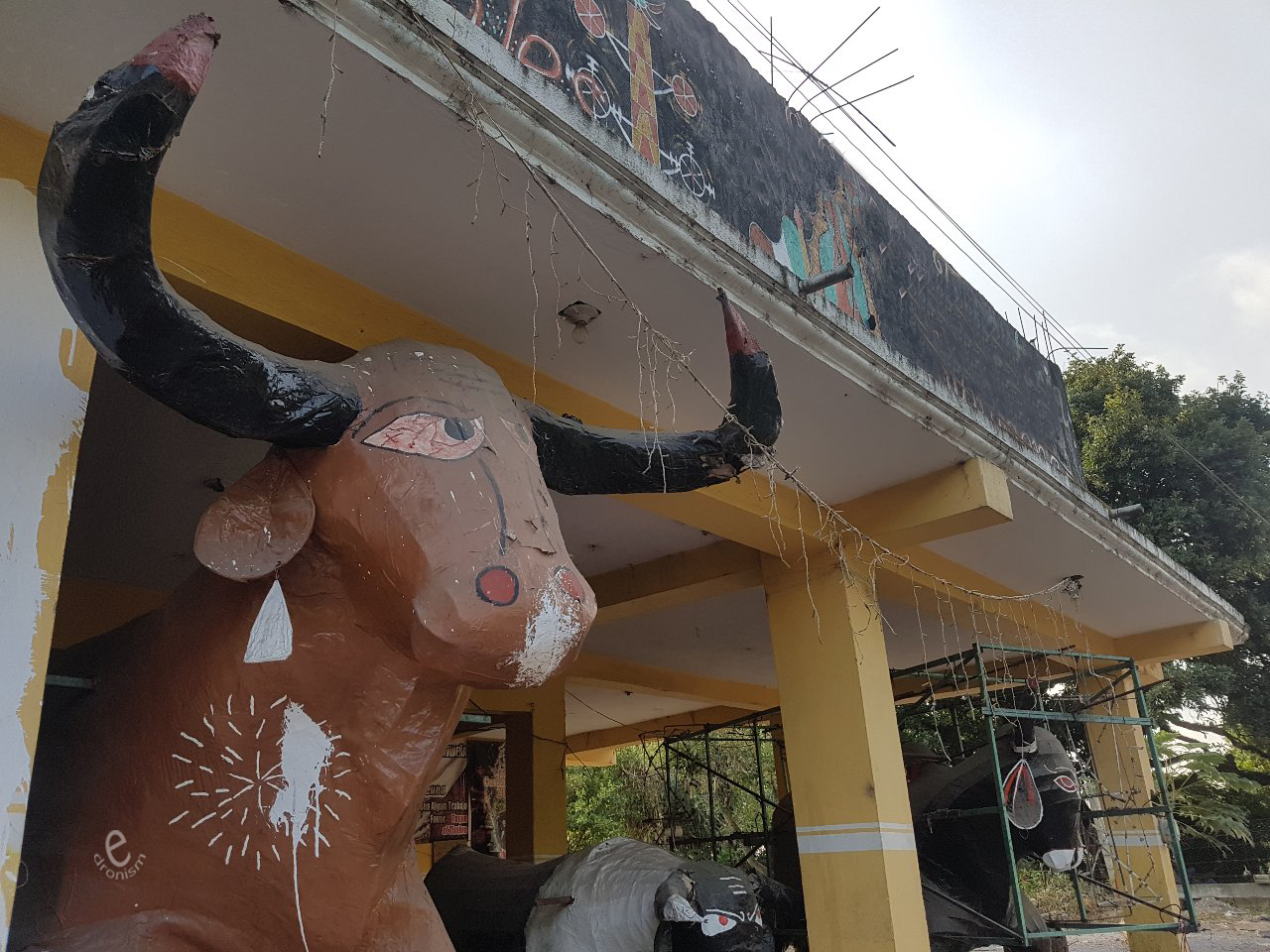 Pirotecnia, una de las actividades de los habitantes